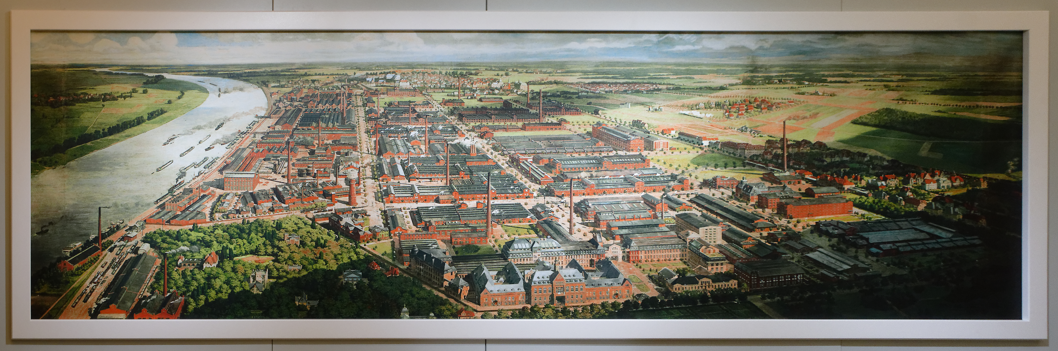 Bild von Otto Bollhagen (1861-1924) in der Villa Römer "Leverkusen" Öl auf Leinwand 183 * 580 cm Die Panoramaansicht zeigt die ab 1895 nach einem Plan von Carl Duisberg systematisch errichteten Farbrikanlagen, Sozialeinrichtungen sowie Beamten- und Arbeitersiedlung der Farbenfabriken. Das Bild wurde zwischen 1912 und 1921 für das Konferenzzimmer der Direktoren der Fabenfabriken gemalt und hängt heute noch in Q26, der alten Hauptverwaltung, die 1912 bei der Verlegung des Firmensitzes nach Leverkusen bezogen wurde und zentral im Vordergrund zu sehen ist. Links davon im Park sind die Villen und oberhalb davon etwas schräg zu den Neubauten der Farbenfabriken die Fabrikgebäude zu sehen, die die Farbenfabriken ab 1891 von der Familie Leverkus übernommen hatten. Das rechtwinklige Straßennetz auf dem Werksgelände lässt 7 Abteilungen erkennen. Baulich und technisch war das Werk aus "einem Guss" die damals modernste Chemieanlage der Welt. Das Raster des Duisberg-Planes prägt das Areal bis heute. Auch für die Standortwahl entscheidenden Vorzüge sind dargestellt: Der Rhein war bedeutsam als Transportweg, als Reservoir für Brauchwasser und als Abwasserfluss. Ein eigener Bahnanschluss bot eine weitere Voraussetzung für den Transport von Massengütern.